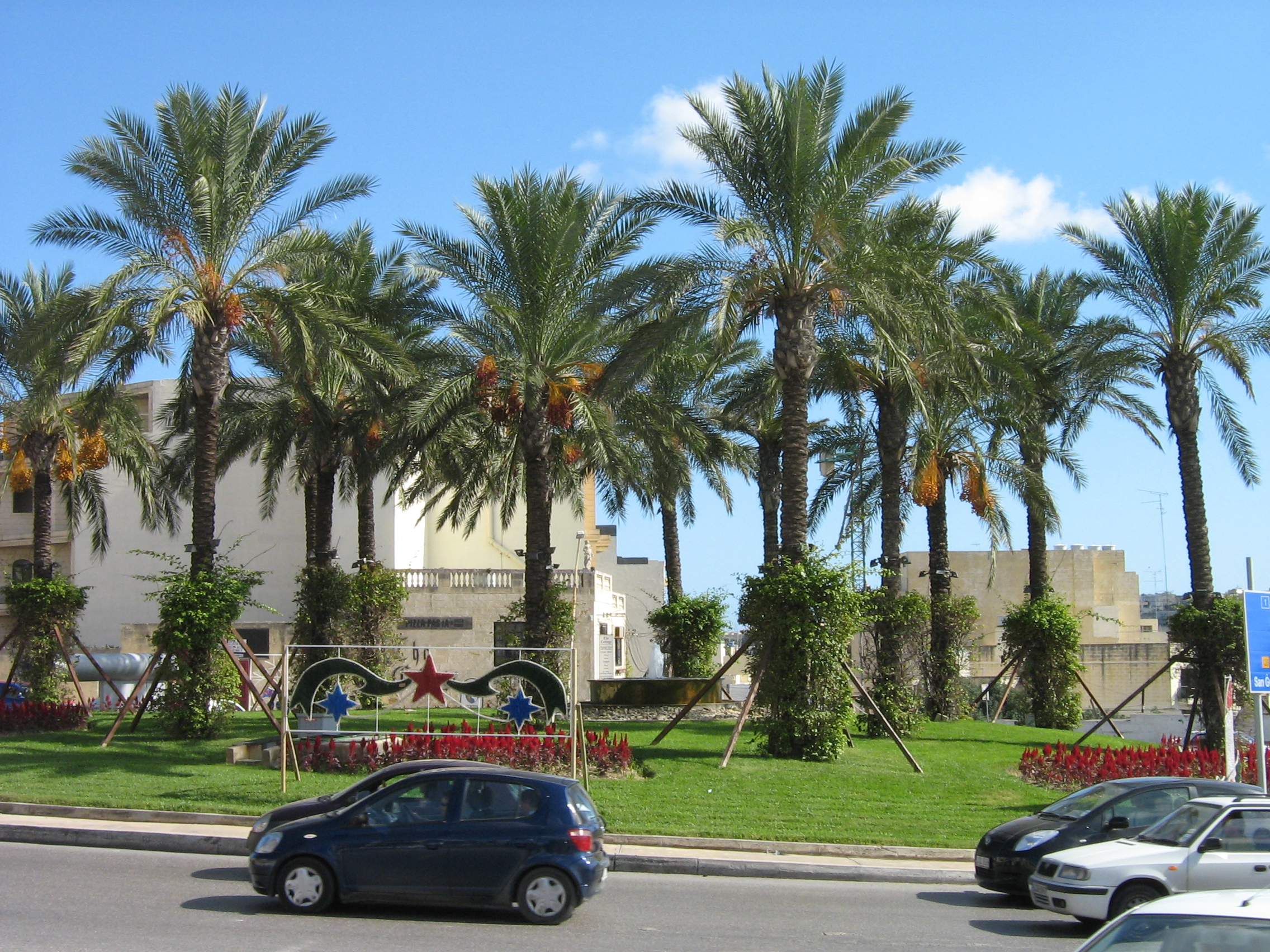 В ноябре еще можно купаться в Средиземном море. Слима. Мальта.